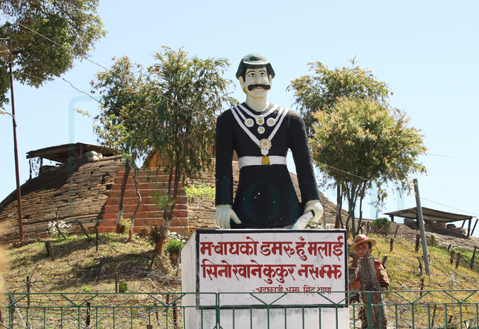 Amaragadhi killa in Dadeldhura Nepal .